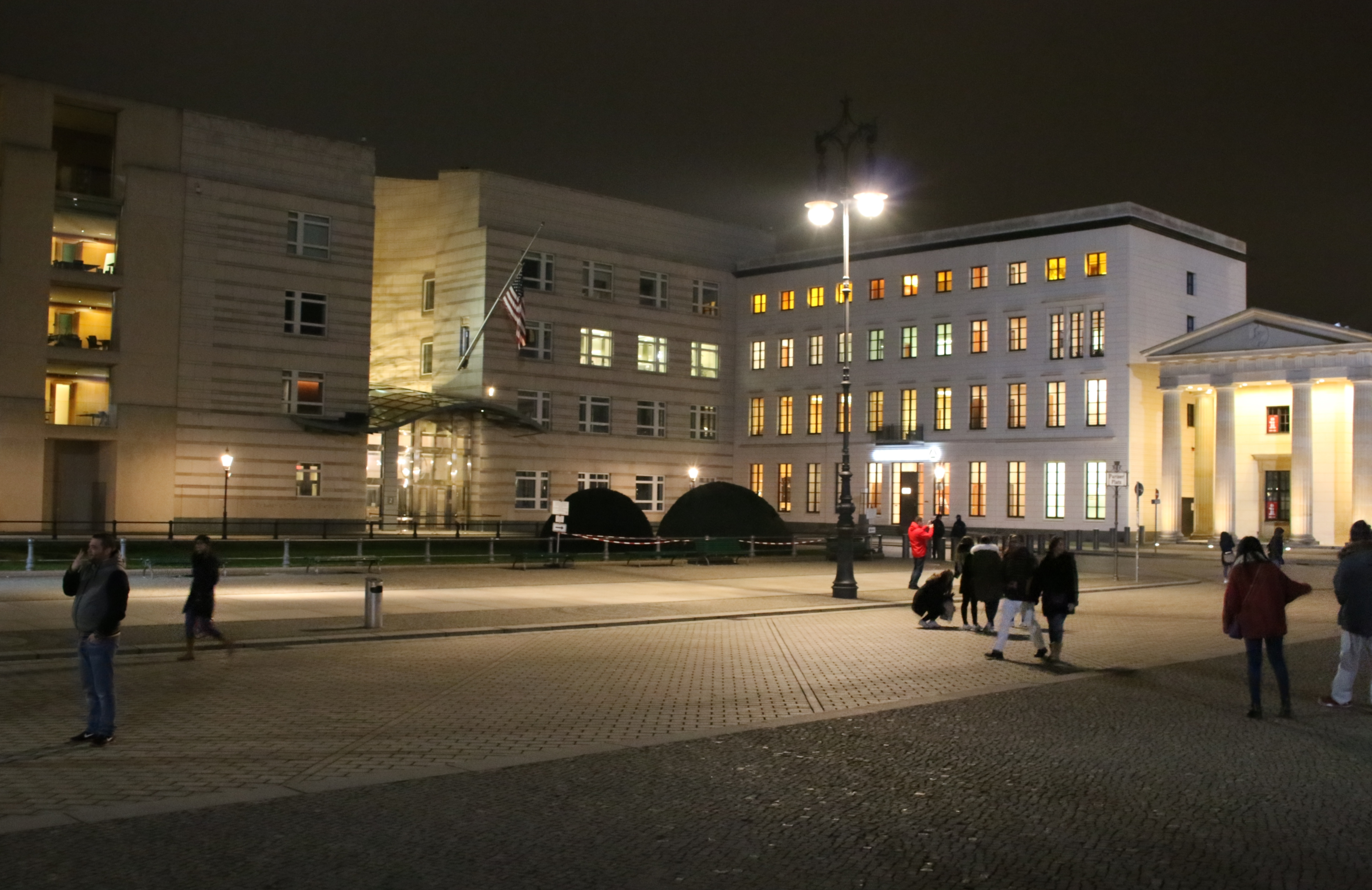 Amerikanische Botschaft in Berlin